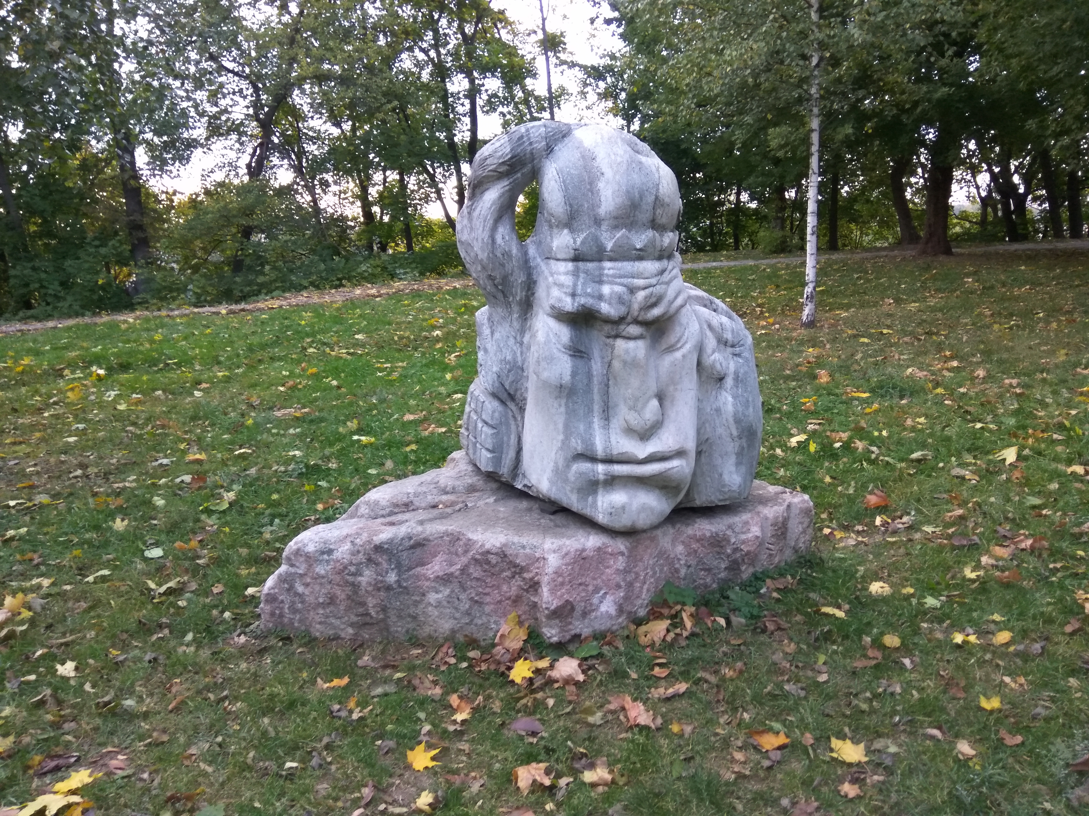 Магілёў. Парк культуры і адпачынку імя М. Горкага